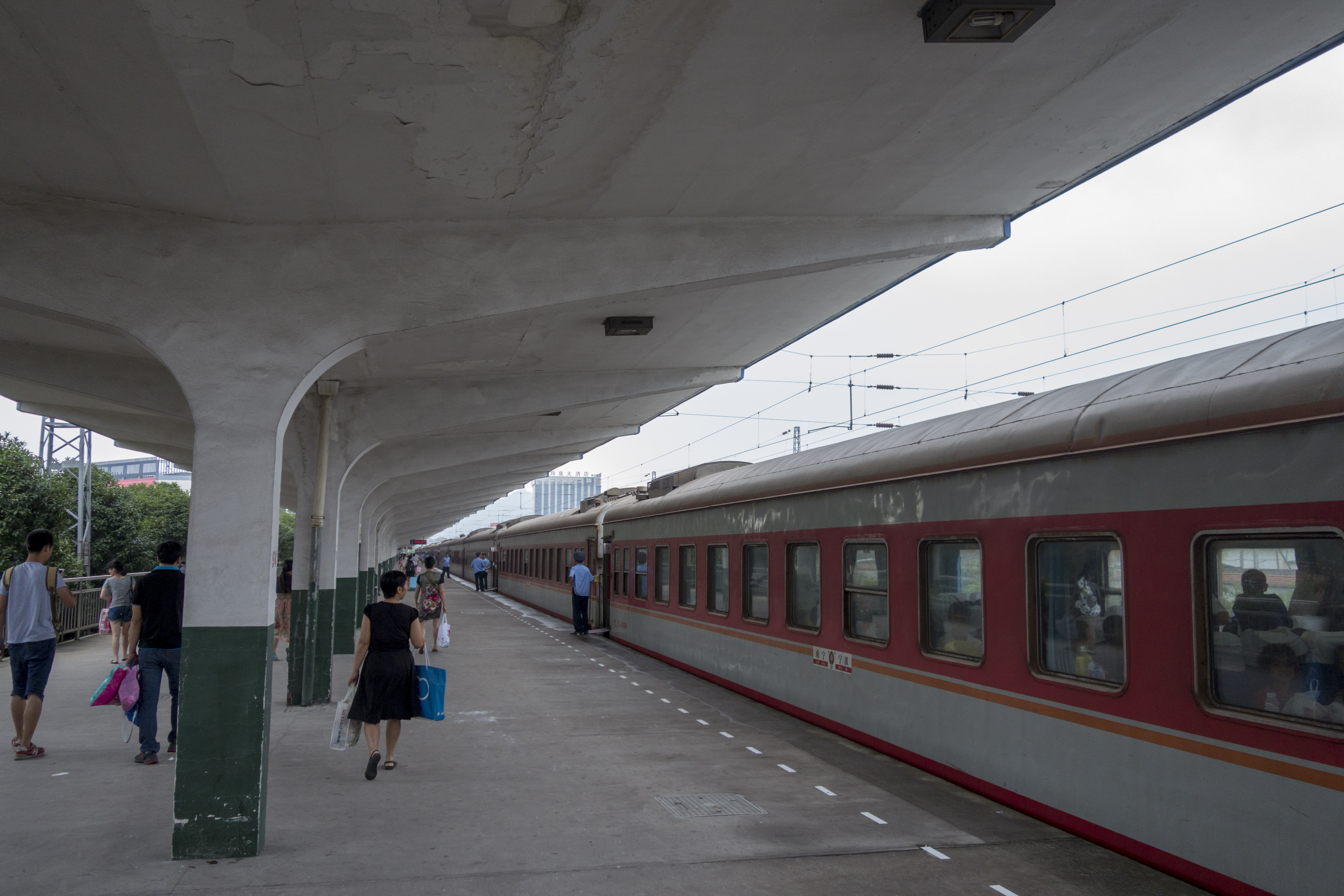 余姚站站台